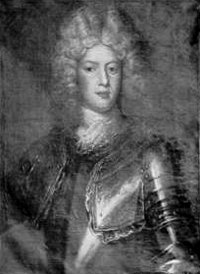 Markgraf Georg Friedrich von Brandenburg-Ansbach (1678-1703)